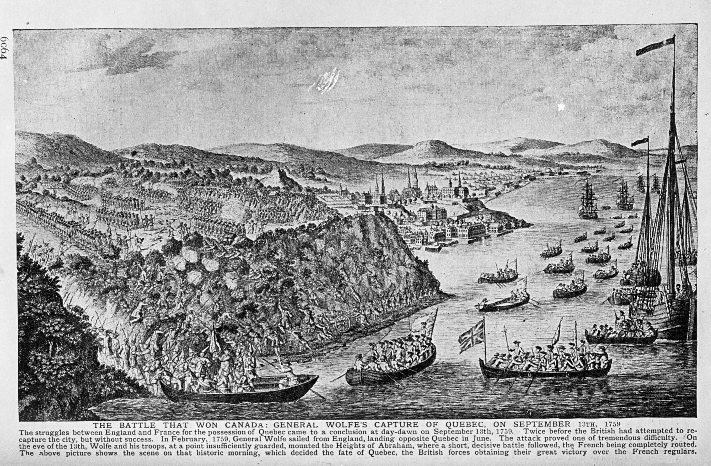 Slaget om Quebec, 13. september 1759